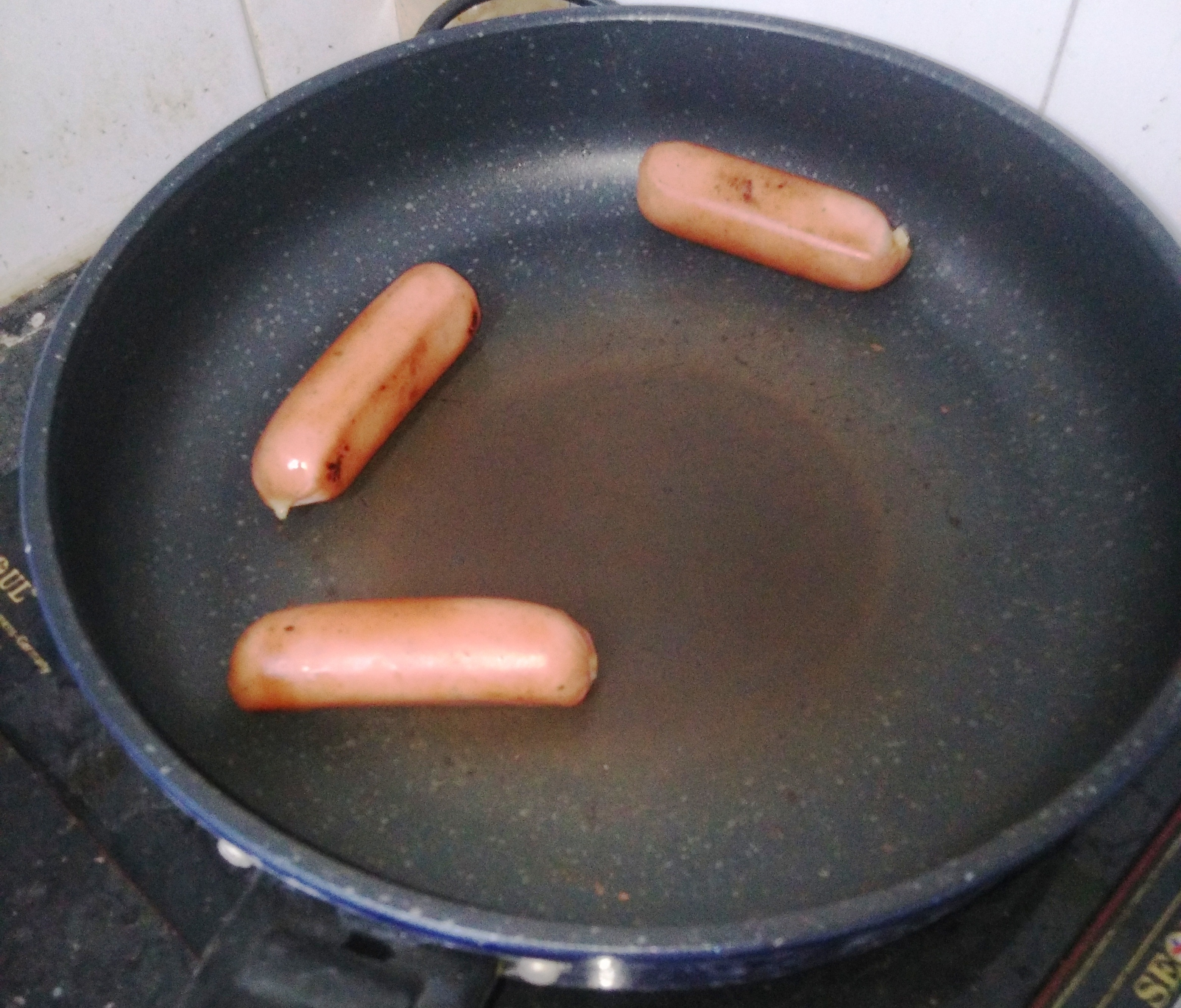 Xúc xích Vissan áp chảo 2018